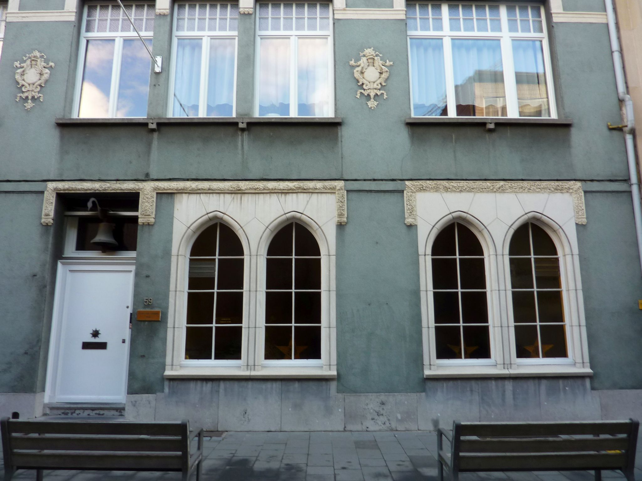 Evangelisch-Lutherse Kerk, Antwerpen